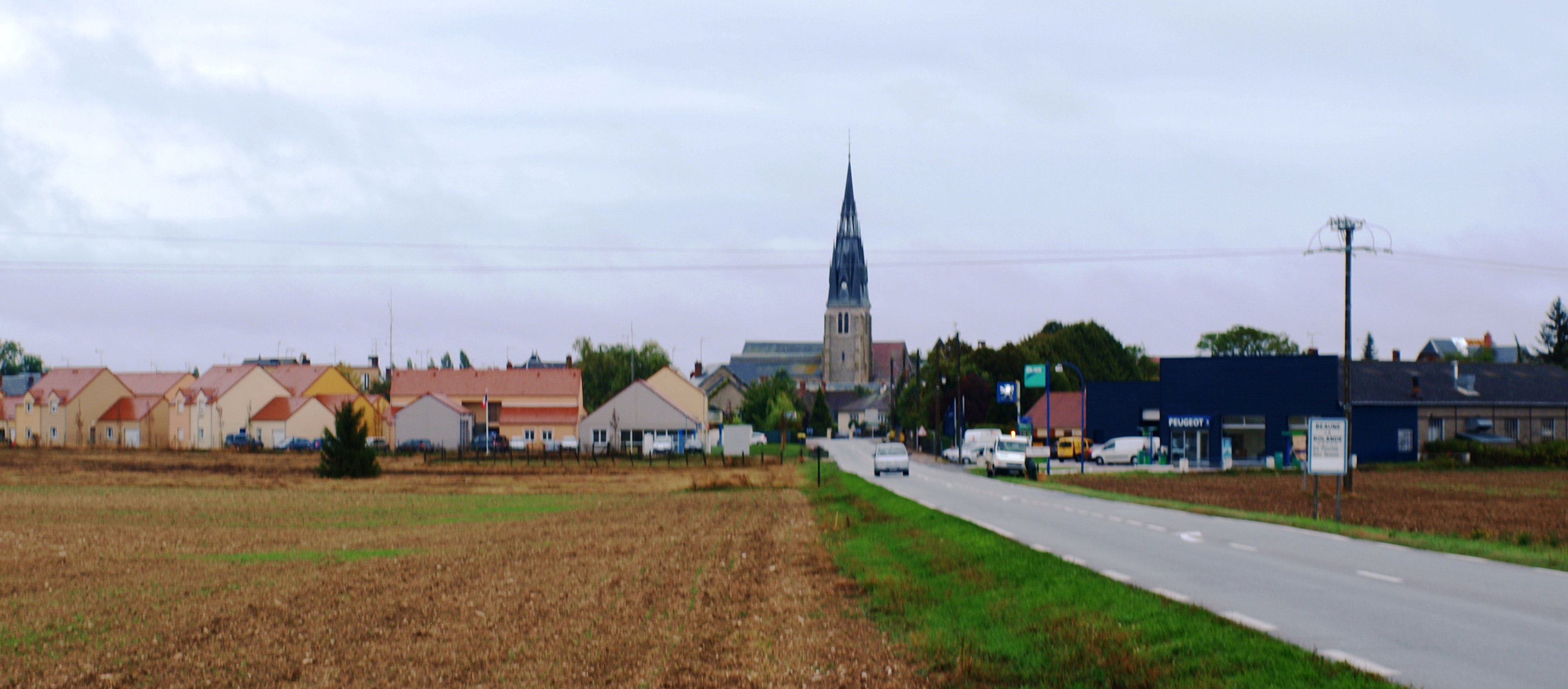 Beaune-la-Rolande (Loiret, France) ; vue générale depuis la route venant de Pithiviers.